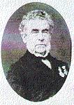 Foto Renier Snieders